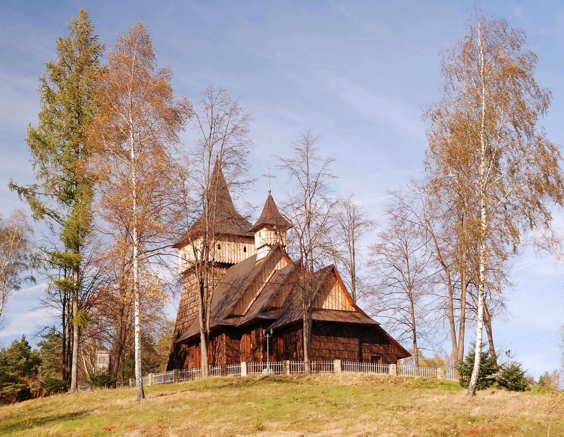 wieś Bukowiec